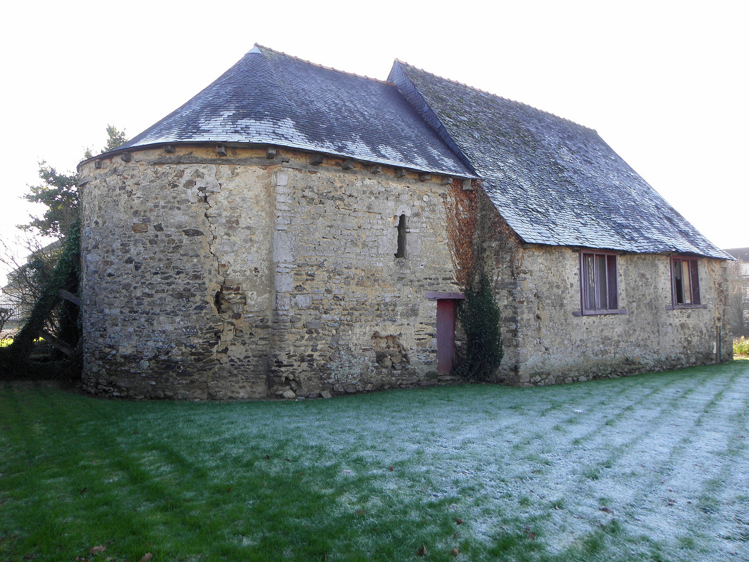 Chapelle Saint-Pierre d'Argentré-du-Plessis (Ille-et-Vilaine, France). Chevet et flanc nord.